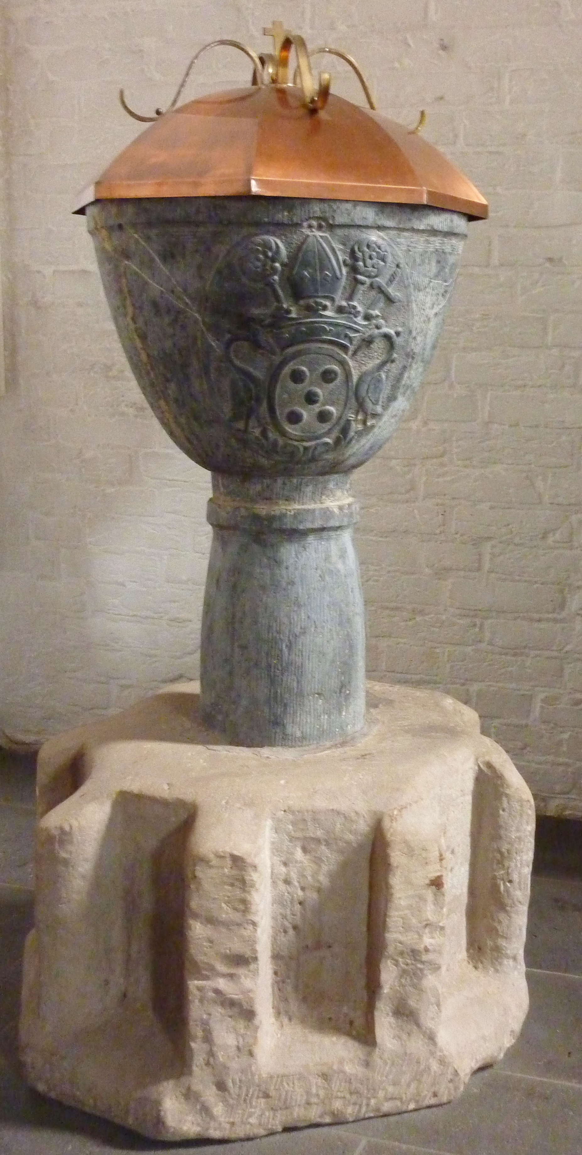 Taufbecken in der katholischen Pfarrkirche St. Michael in Großbüllesheim mit dem Wappen von Karl Ludwig von Sickingen-Ebernburg